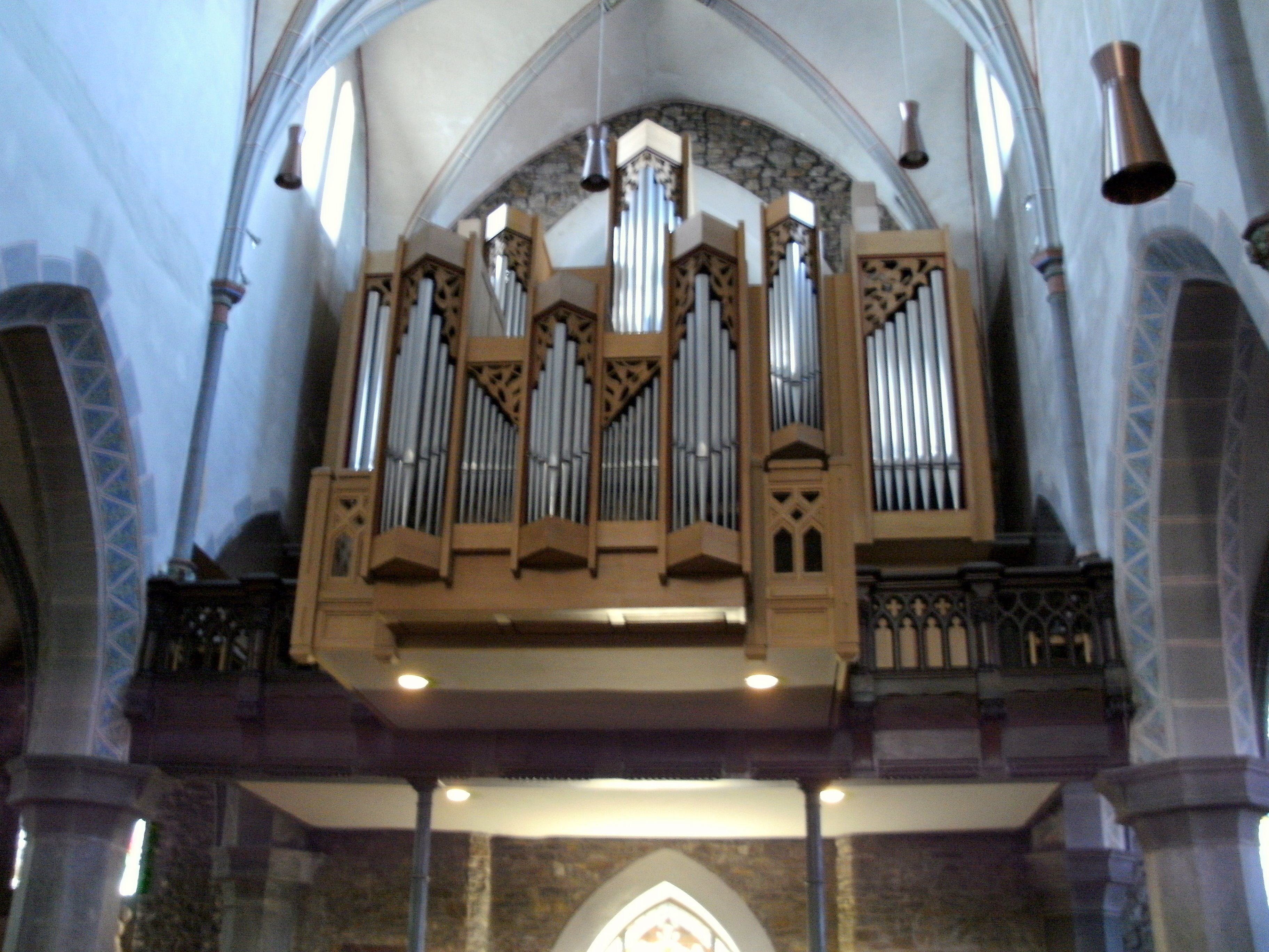 Orgel St. Hubertus in Büsbach